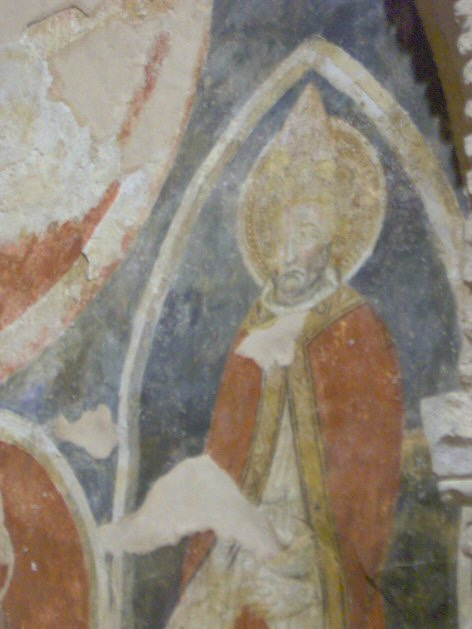 Marco Vaccaro - Affresco di San Giustino